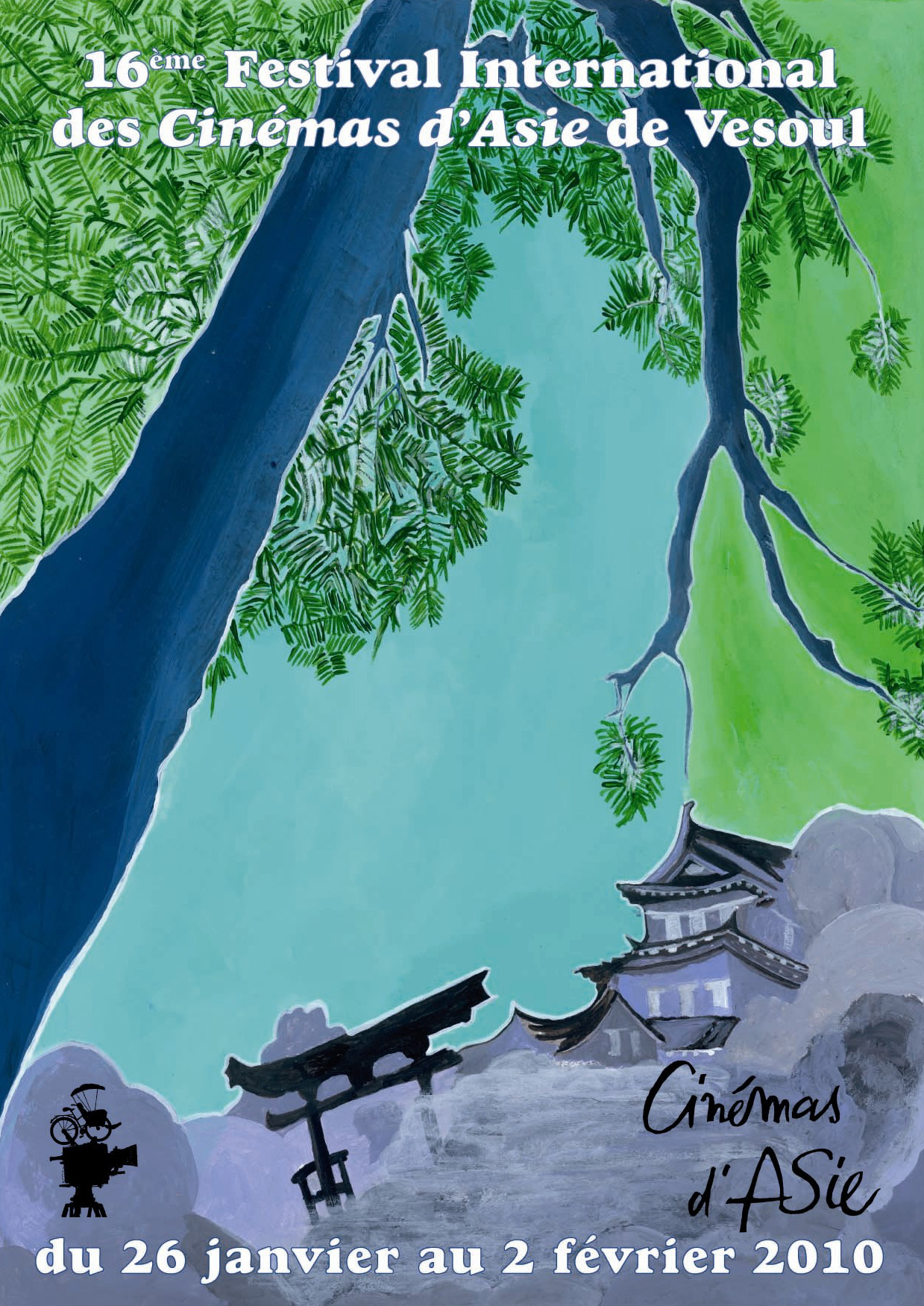 Visuel FICA 2010